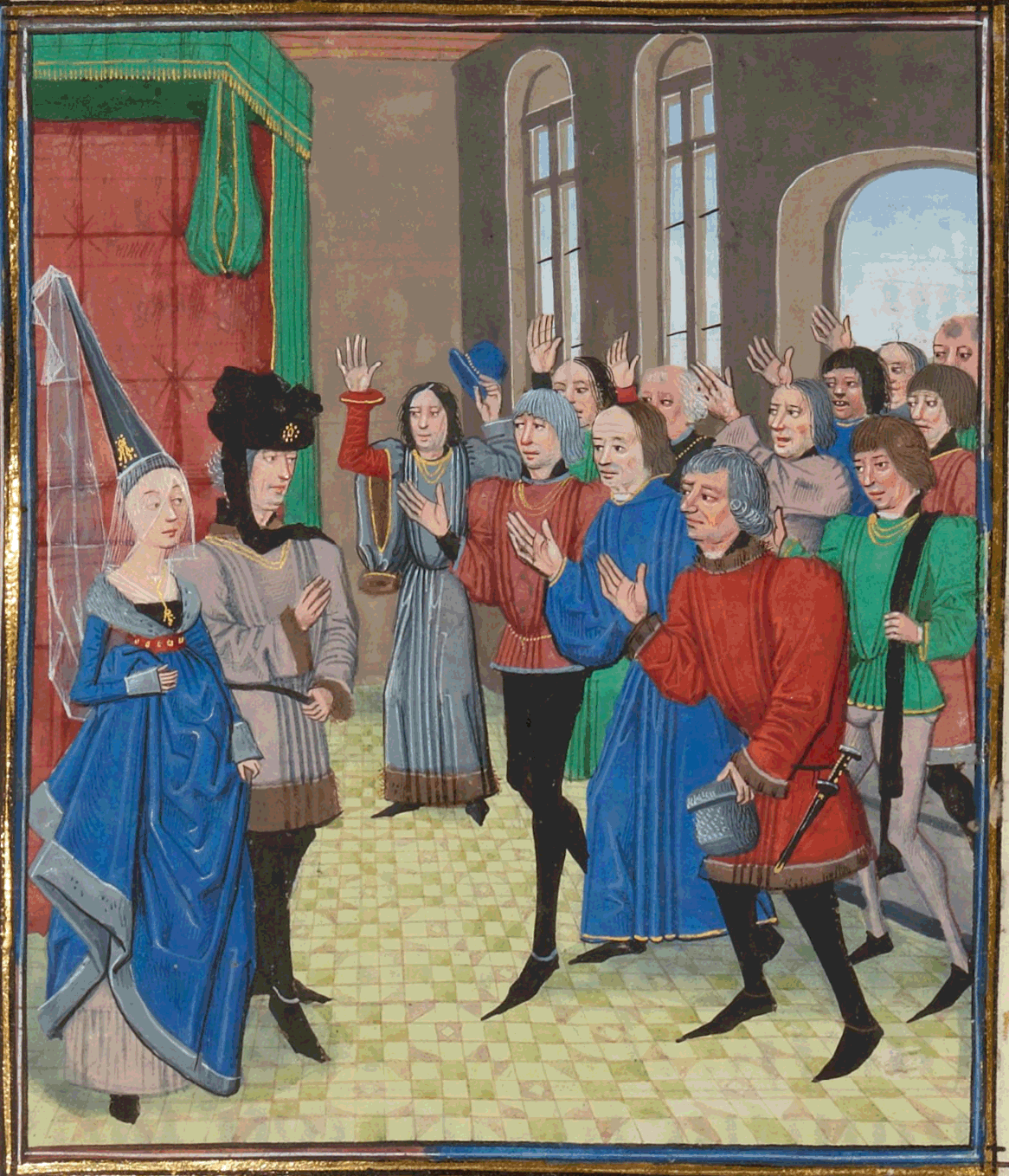 Habitants de Nantes prêtent hommage à Jean de Montfort.